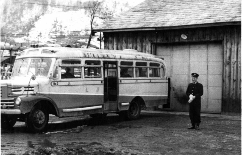 Kuri1423所有 1951年撮影 三菱鉱業美唄鉄道バス大夕張営業所